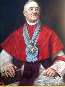 Reprodukcja "Portretu ks. kanonika Aleksandra Malanowicza" autorstwa Jana Styki ok. 1880-1890 r. Obraz na stannie kościoła św. Zygmunta w Szydłowcu